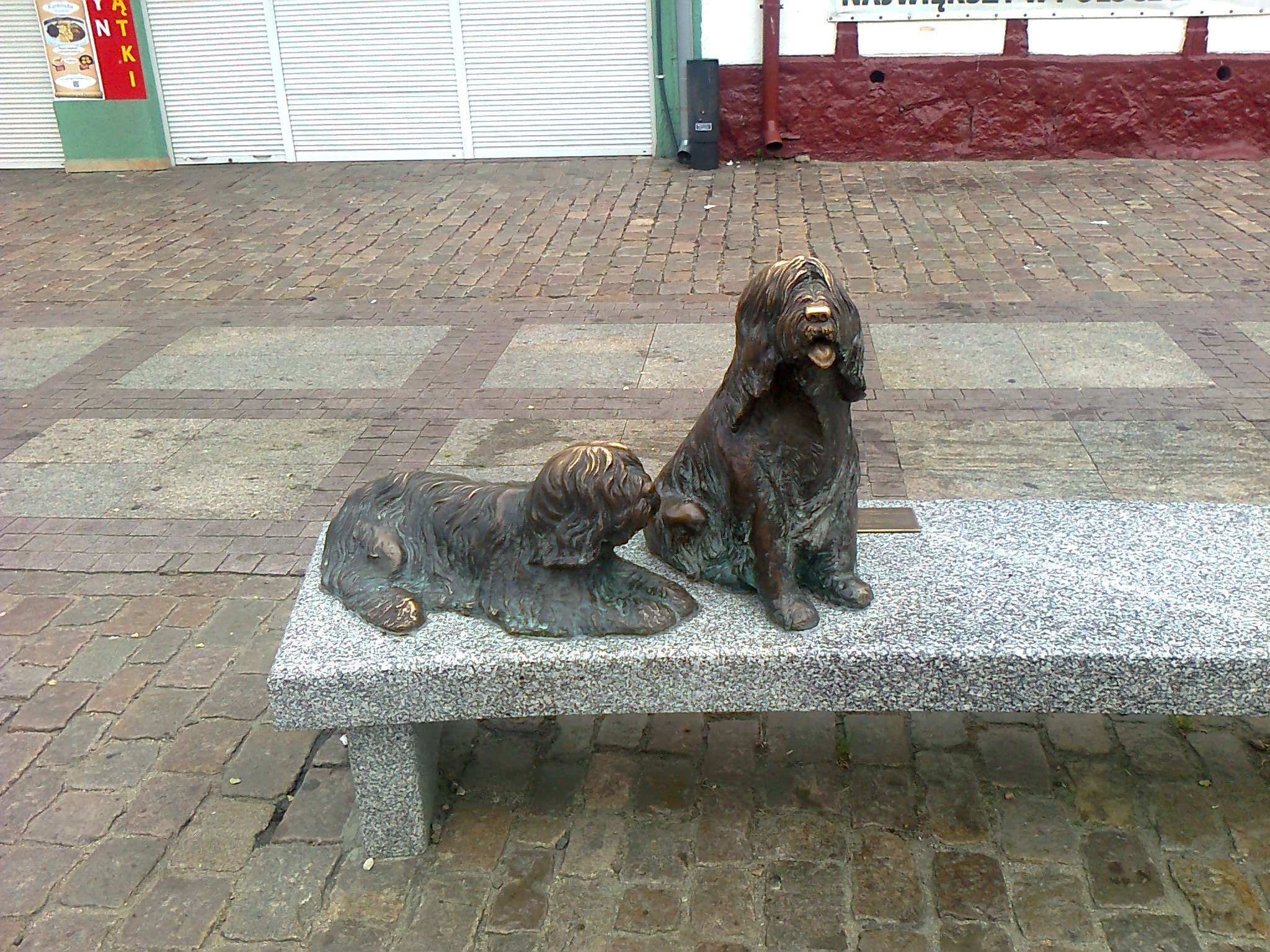 Pomnik Danuty Hryniewicz Łebie